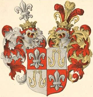 Saltza suguvõsa parunivapp